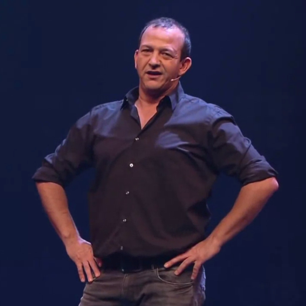 Najib Amhali - Daten. Nu al een klassieker uit de voorstelling 'Alles Komt Goed' Bekijk de video en beoordeel zelf of het grappig is. Abonneer je op mijn officieel kanaal: OfficialNajibAmhali